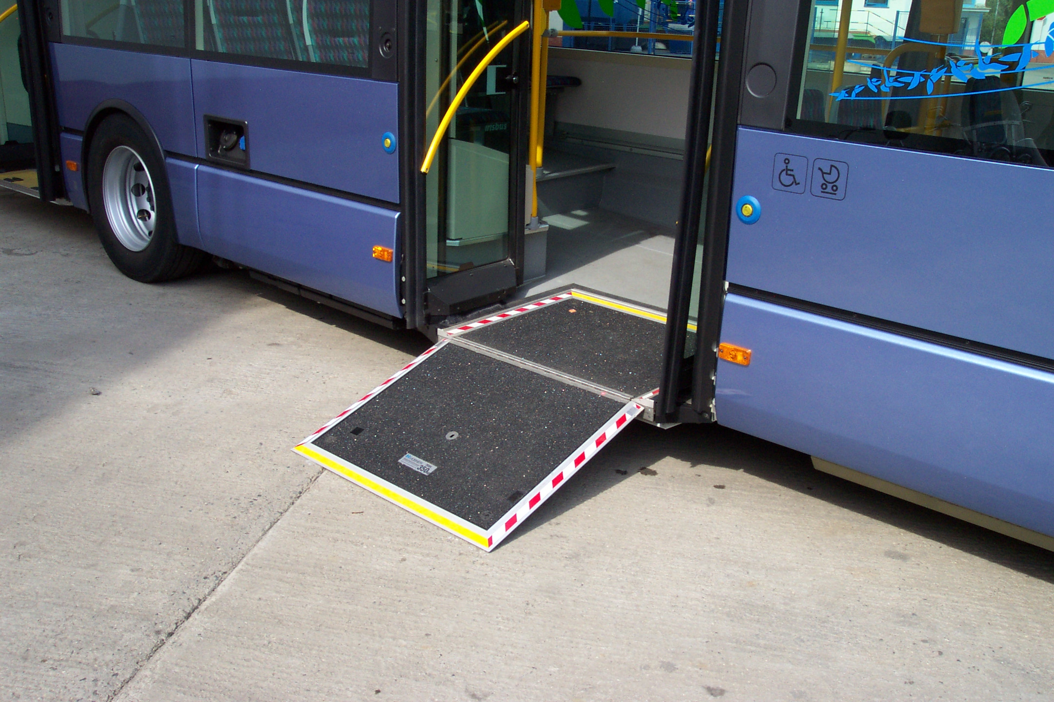 Irisbus Citelis in Prague DOD (opened doors day), access ramp - Předváděcí autobus typu Irisbus Citelis na DOD v Praze, vysouvací plošina